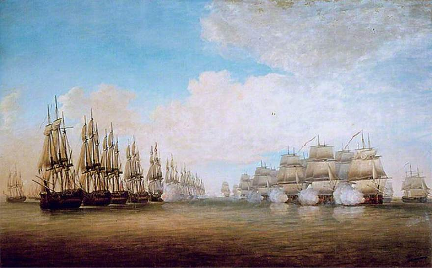 Représentation de la bataille de Sadras, le 17 février 1782, au large des côtes de l'Inde. Peinture de Dominique Serres.